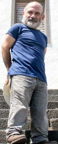 Actor Emilio Gavira